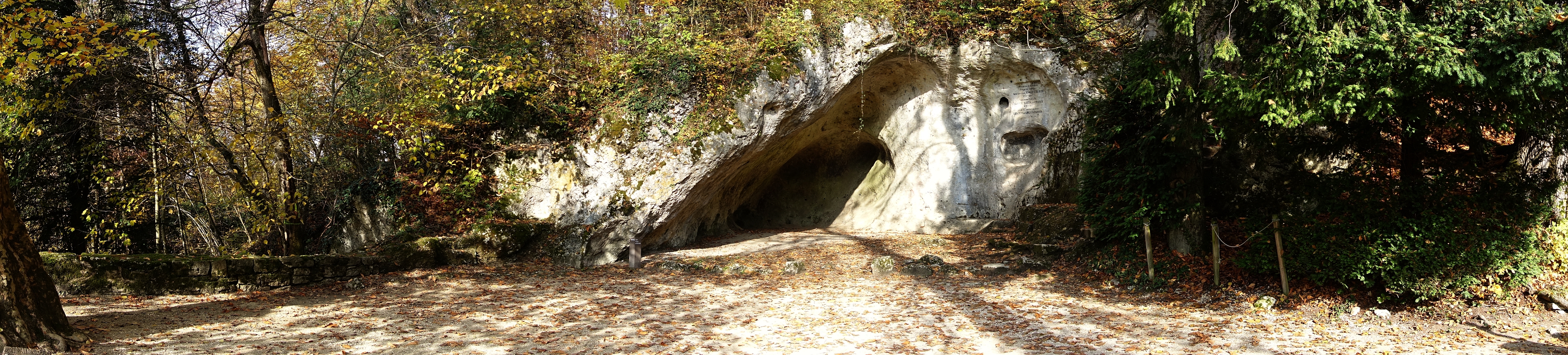 Ermitage Arlesheim, Karusellplatz, An diesem prähistorisch interessanten Ort, wo man Funde entdeckt hat, die 17'000 Jahre alt sind, entstand ein Spielplatz mit einem Holzkarussell und verschiedenen Ball-, Ring- und Geschicklichkeitsspielen. Die Inschrift im Felsen erinnert an die Besitzer Achilles Alioth und seine Frau Lucie Alioth-Frank (zwischen 1871 und 1889)